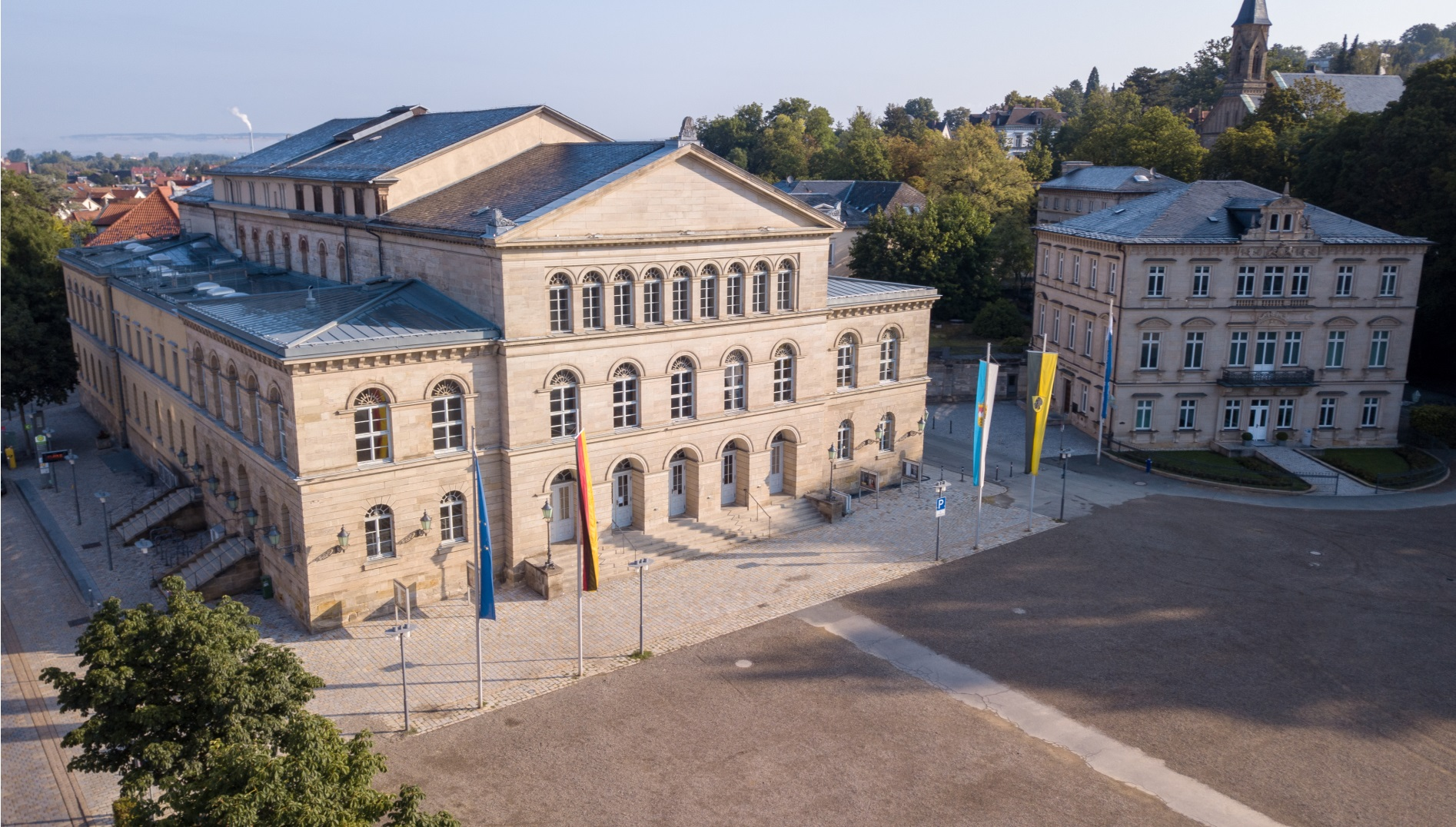 Landestheater Coburg und Palais Edinburgh im August 2019